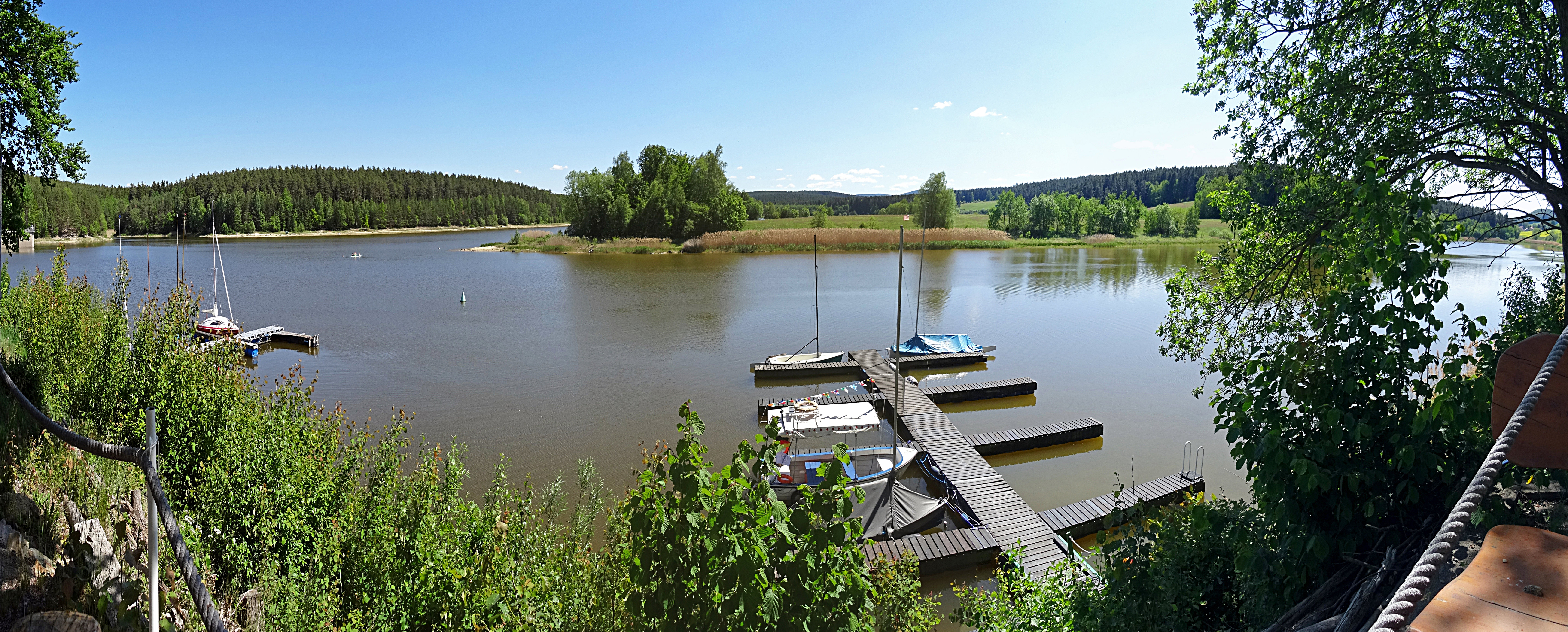 Talsperre Heyda von Norden